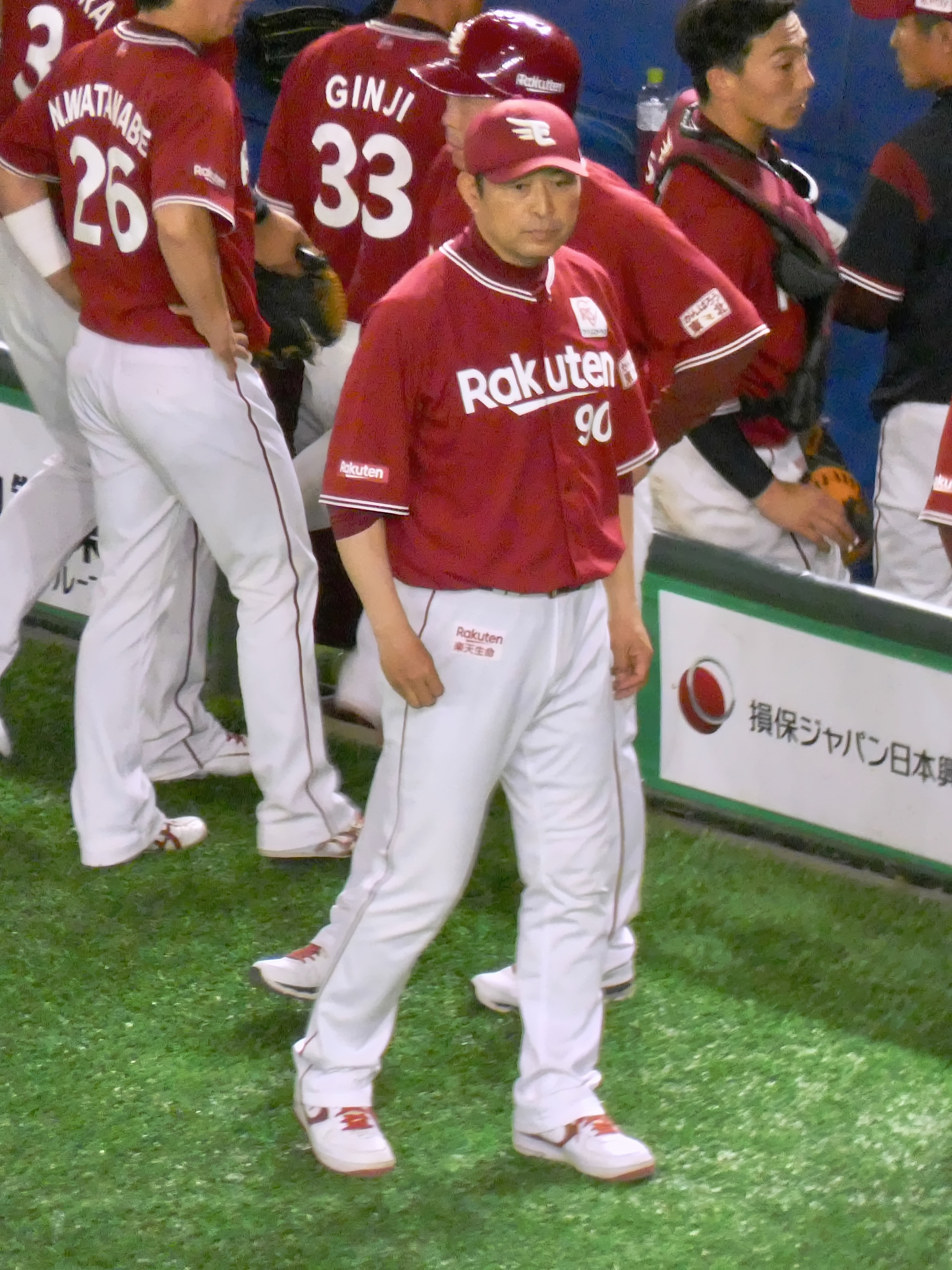 東北楽天ゴールデンイーグルスのコーチ「光山英和」。東京ドームにて。